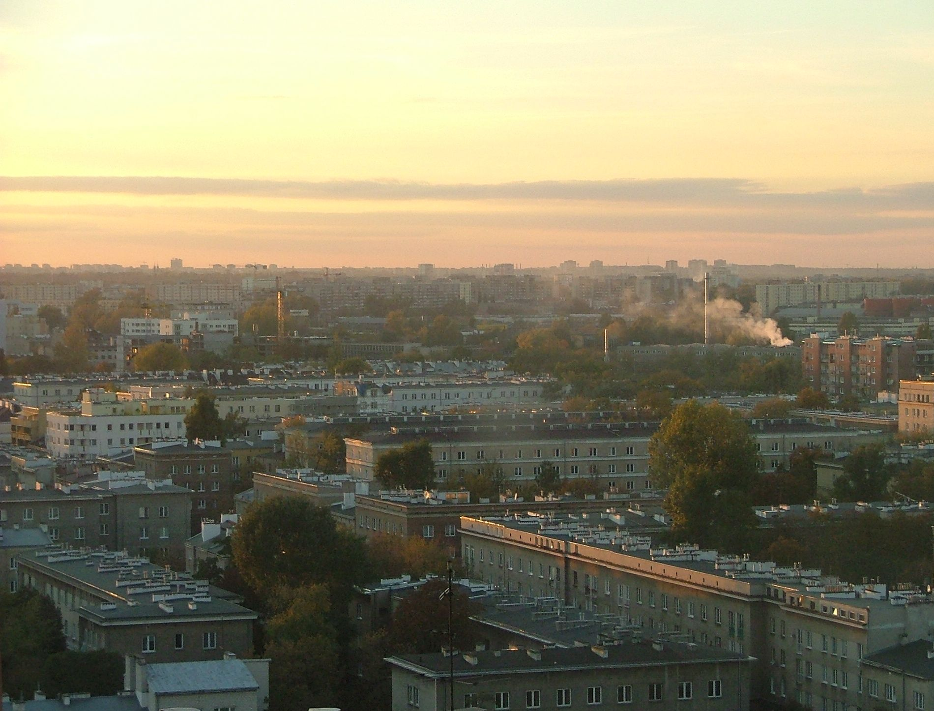 Poland, Warsaw. Widok na Grochów